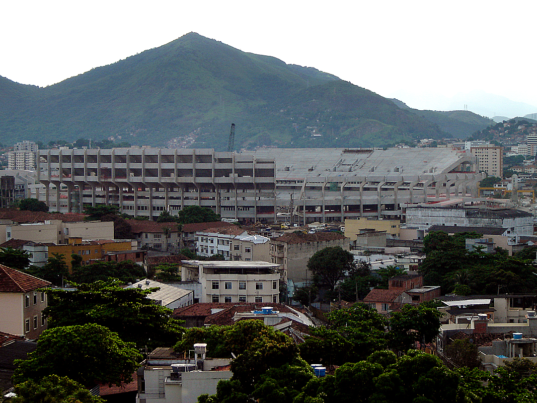 O Estádio João Havelange abrigará as provas de atletismo e terá capacidade para 45 mil espectadores. Ficará a 13 quilômetros da Vila Pan-americana, com acesso rápido e fácil pela Linha Amarela, uma via expressa que liga o bairro do Engenho de Dentro, onde se localiza o estádio, à Barra da Tijuca.